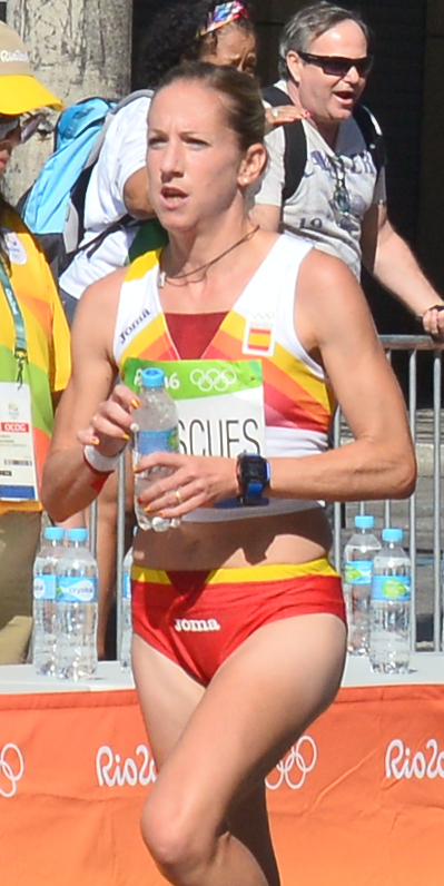 Passage du marathon des jeux olympiques de Rio 2016 dans le centre de Rio